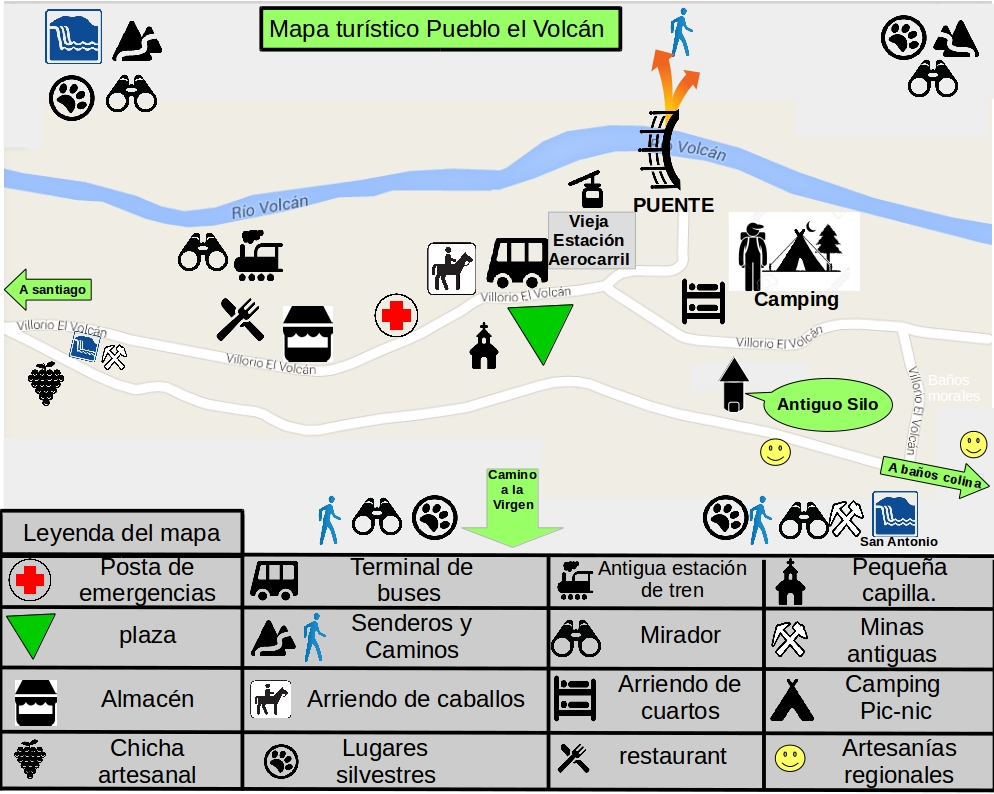 actractivos y servicios del pueblo el volcan